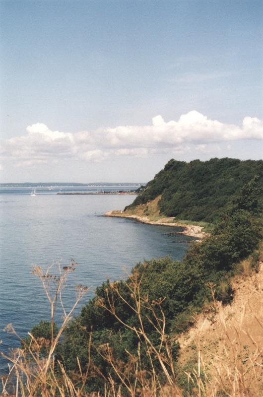 The island Ven in Öresund, Sweden